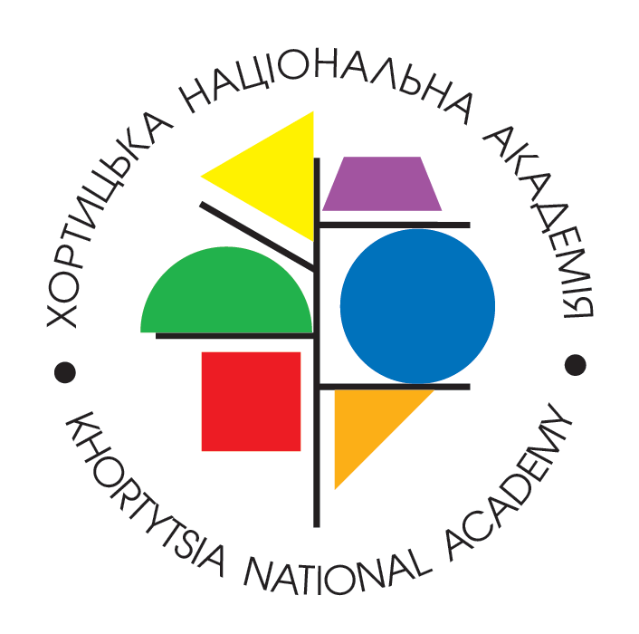 Логотип Хортицької національної академії